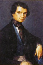 Francisco Navarro Villoslada